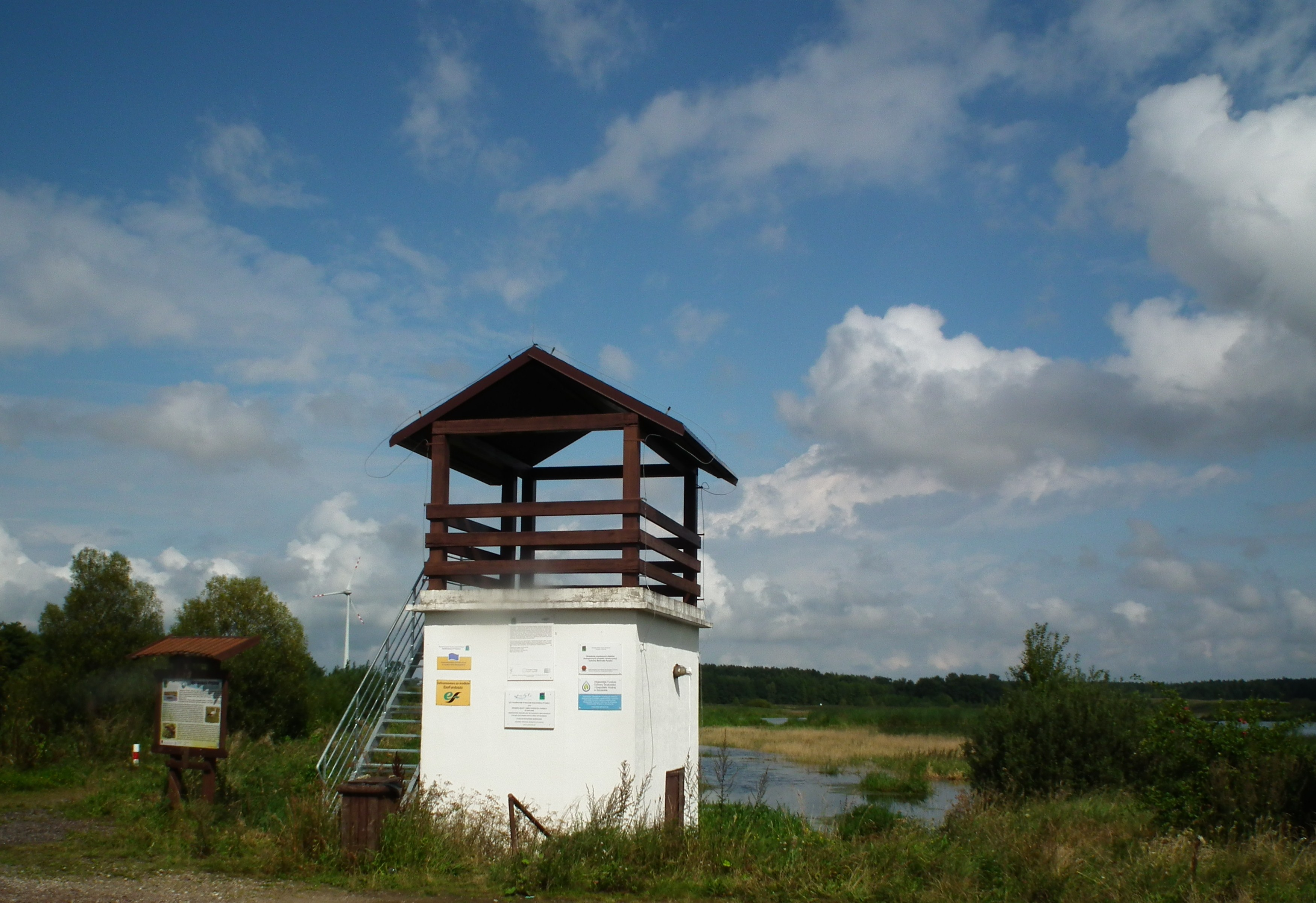 Mokradło Pyszka w gm. Dygowo.